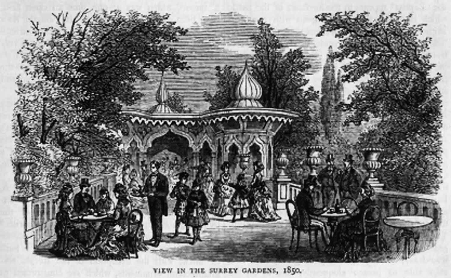 Surrey Gardens in 1850